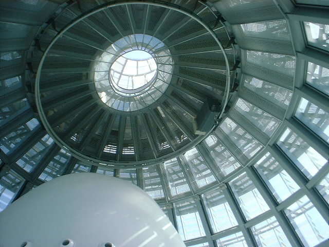 Int. cúpula torre Agbar, Barcelona.